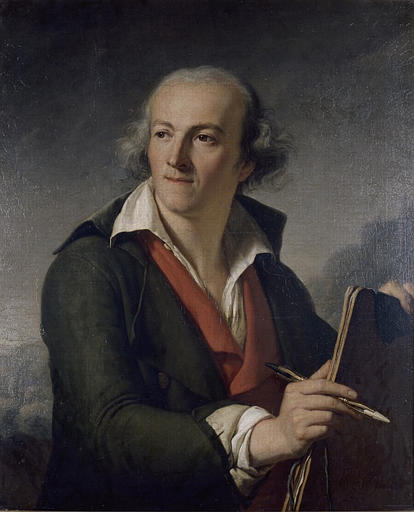 Louis-Joseph Jay, professeur de peinture et fondateur du musée de Grenoble en février 1798.